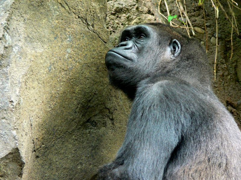 Самка гориллы